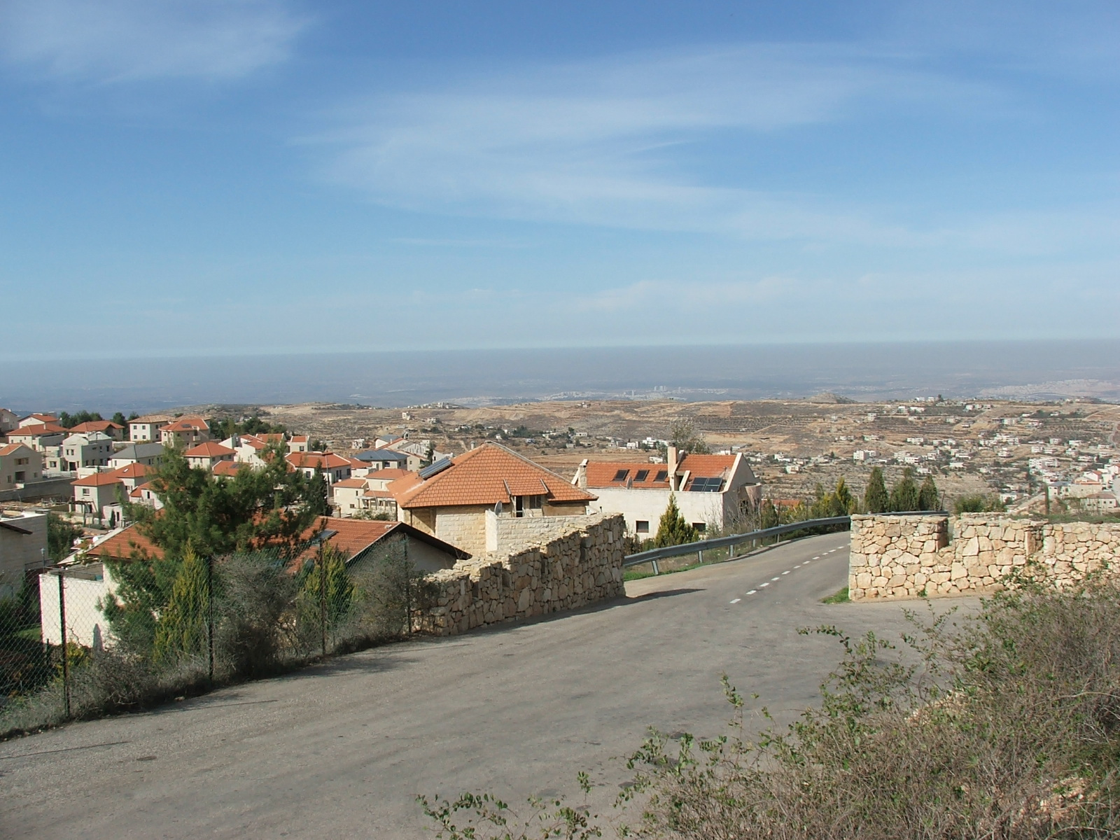 תצלום מאתר ההנצחה שבראש היישוב לכיוון מערב, ניתן לראות את גגות הבתים והגבעות שממערב ליישוב.